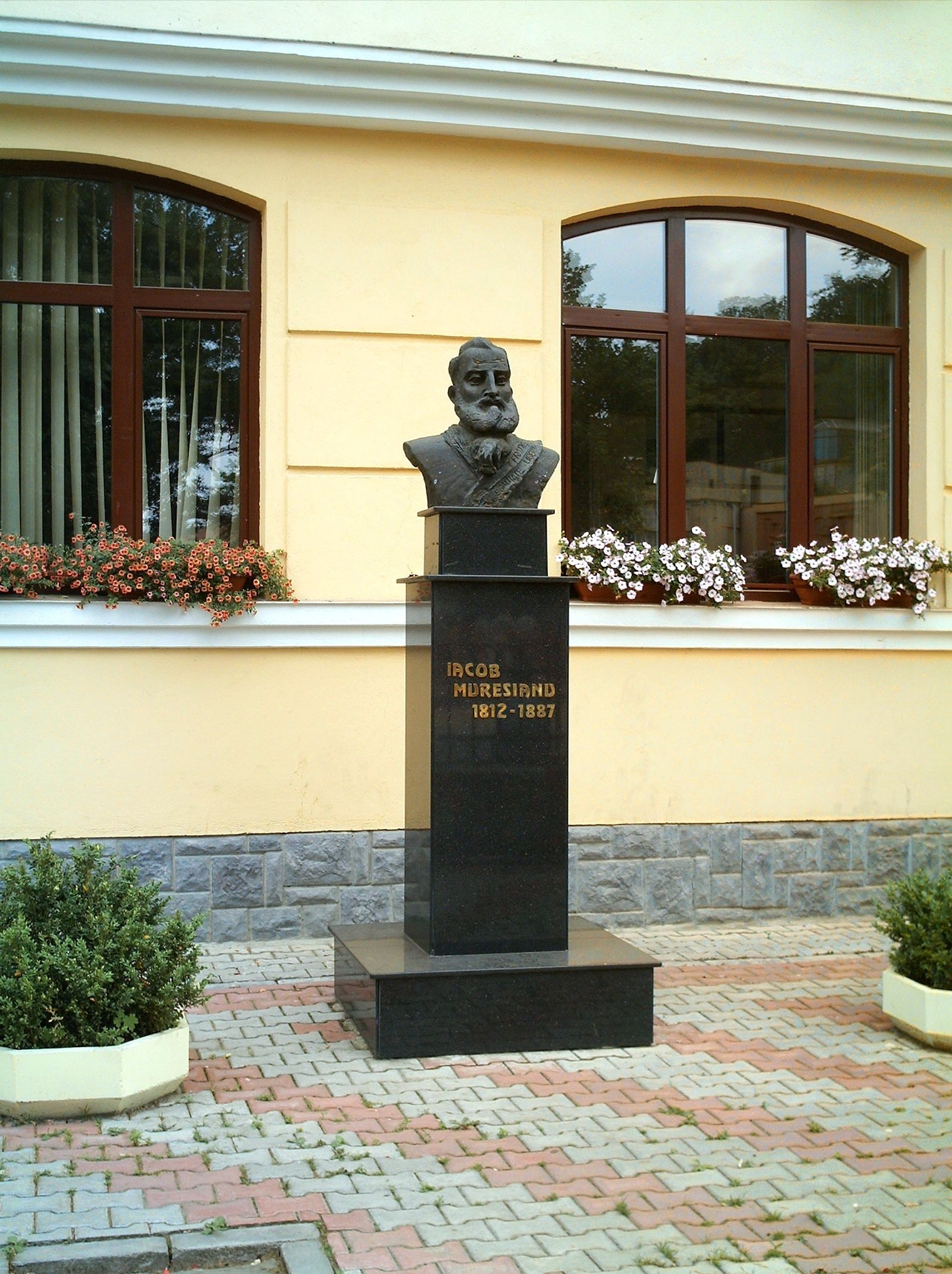 Iacob Mureşianu